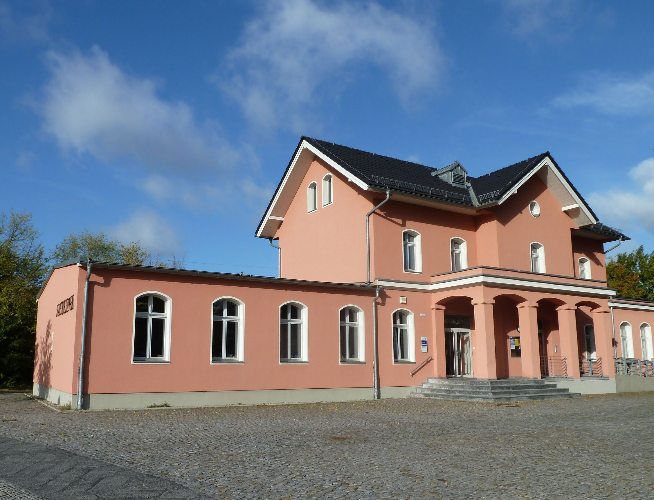 Hennigsdorf, altes Bahnhofsgebäude, jetzt Bibliothek.